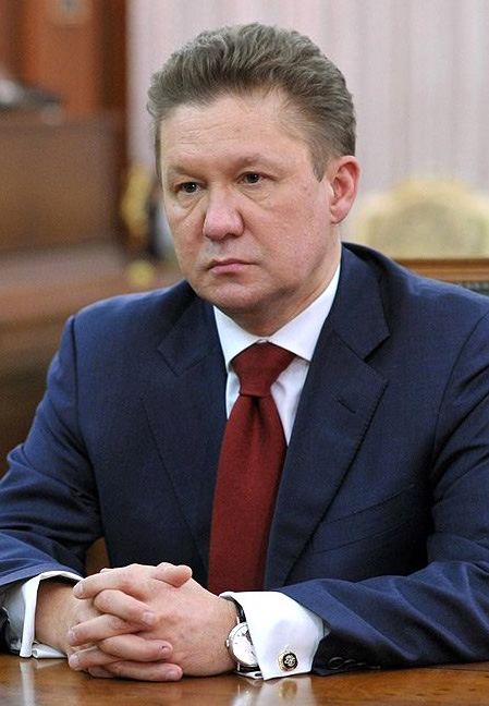 Председатель правления компании «Газпром» Алексей Миллер на встречи с Президентом России Владимиром Путиным